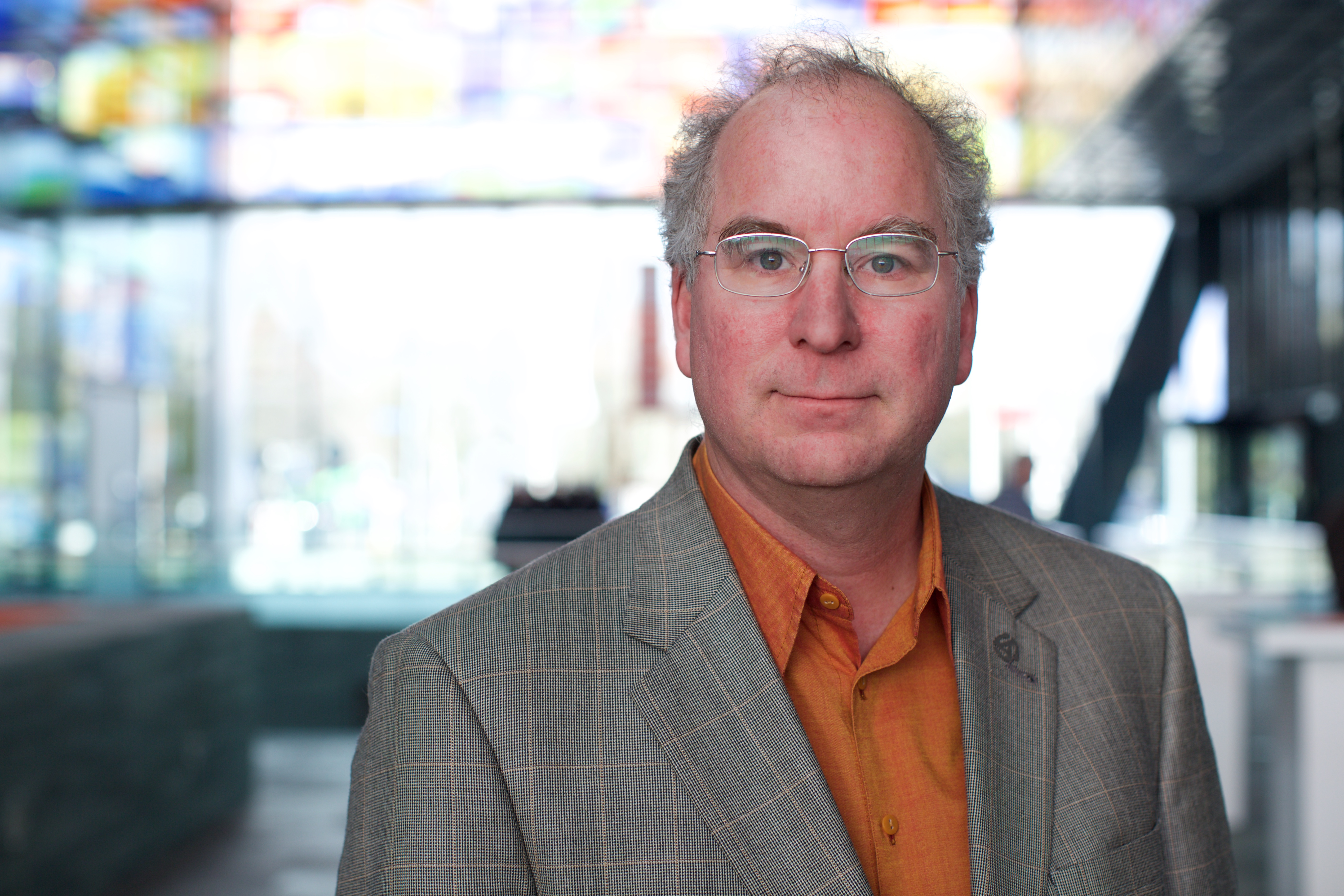 Brewster Kahle bij de afsluiting van Beelden voor de Toekomst